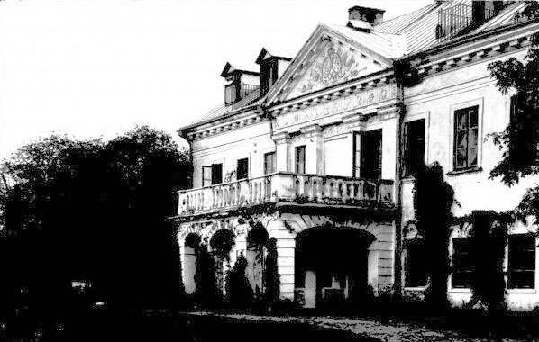 Беларуская (тарашкевіца): Бераставіца Мураваная (Bierastavica Muravanaja), сядзіба Солтанаў (Sołtan)